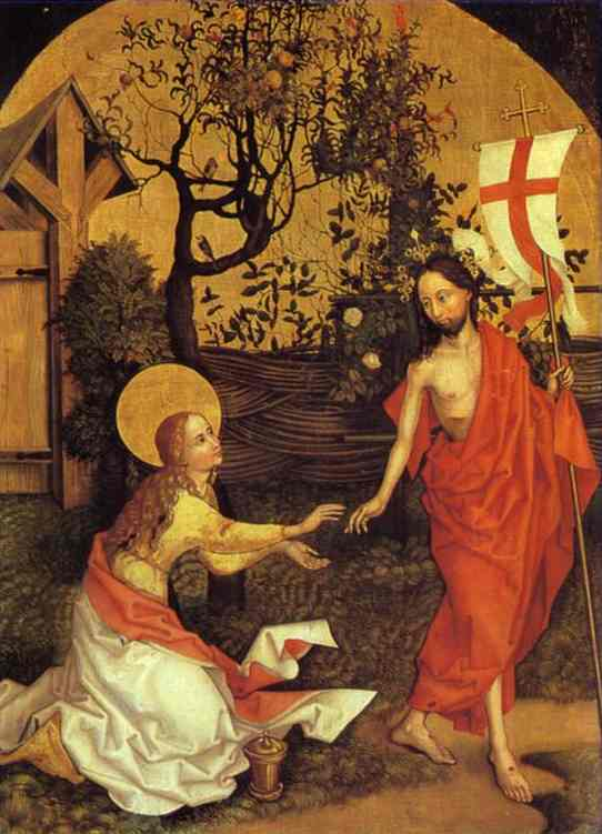 detail